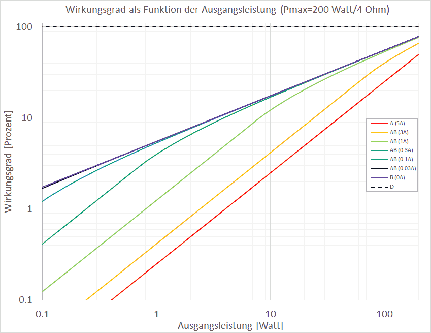 Wirkungsgrad eines 200 Watt/4 Ohm-Verstärkers in Abhängigkeit von der Ausgangsleistung und dem Verstärkerprinzip